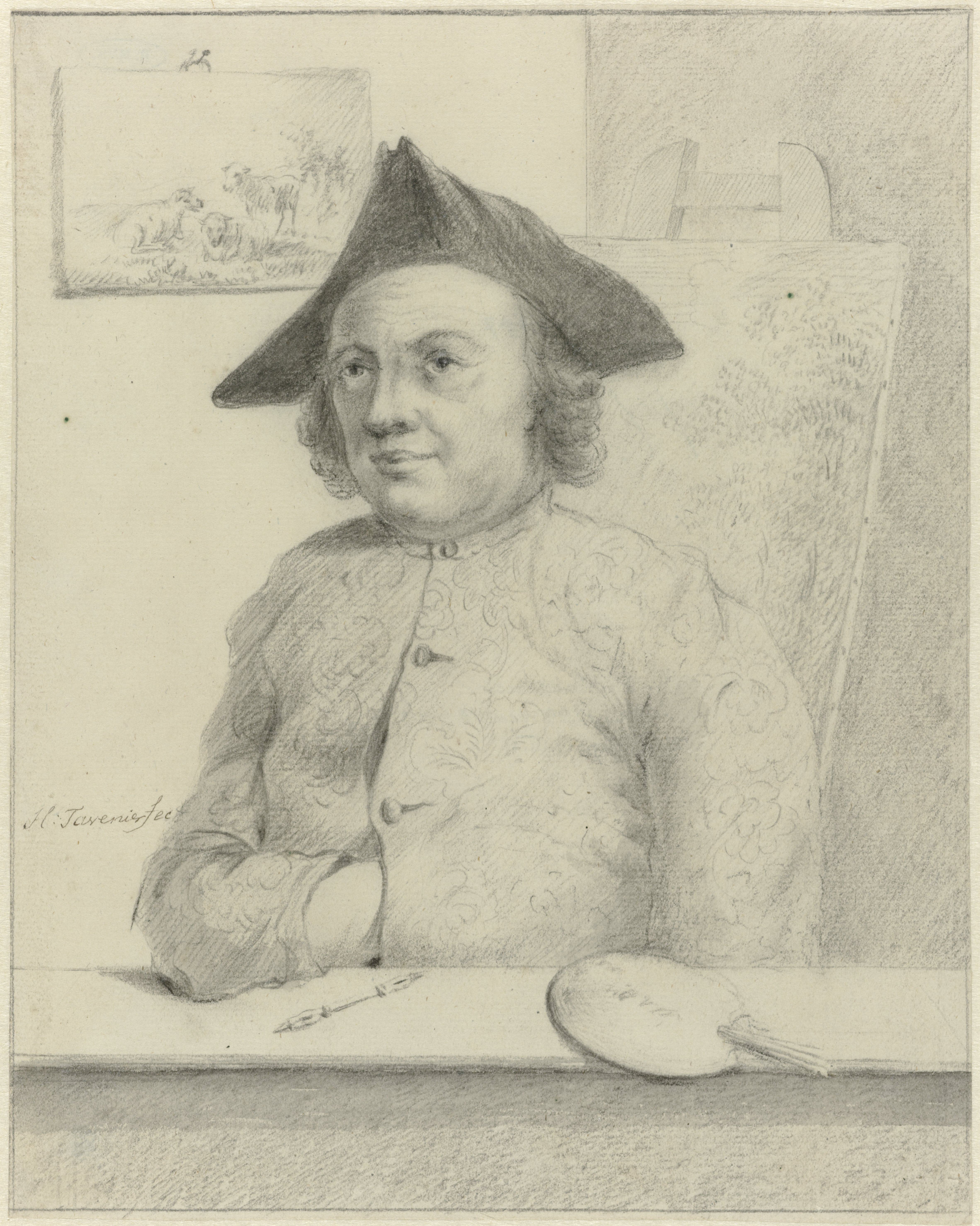 Zelfportret van schilder Hendrik Tavenier